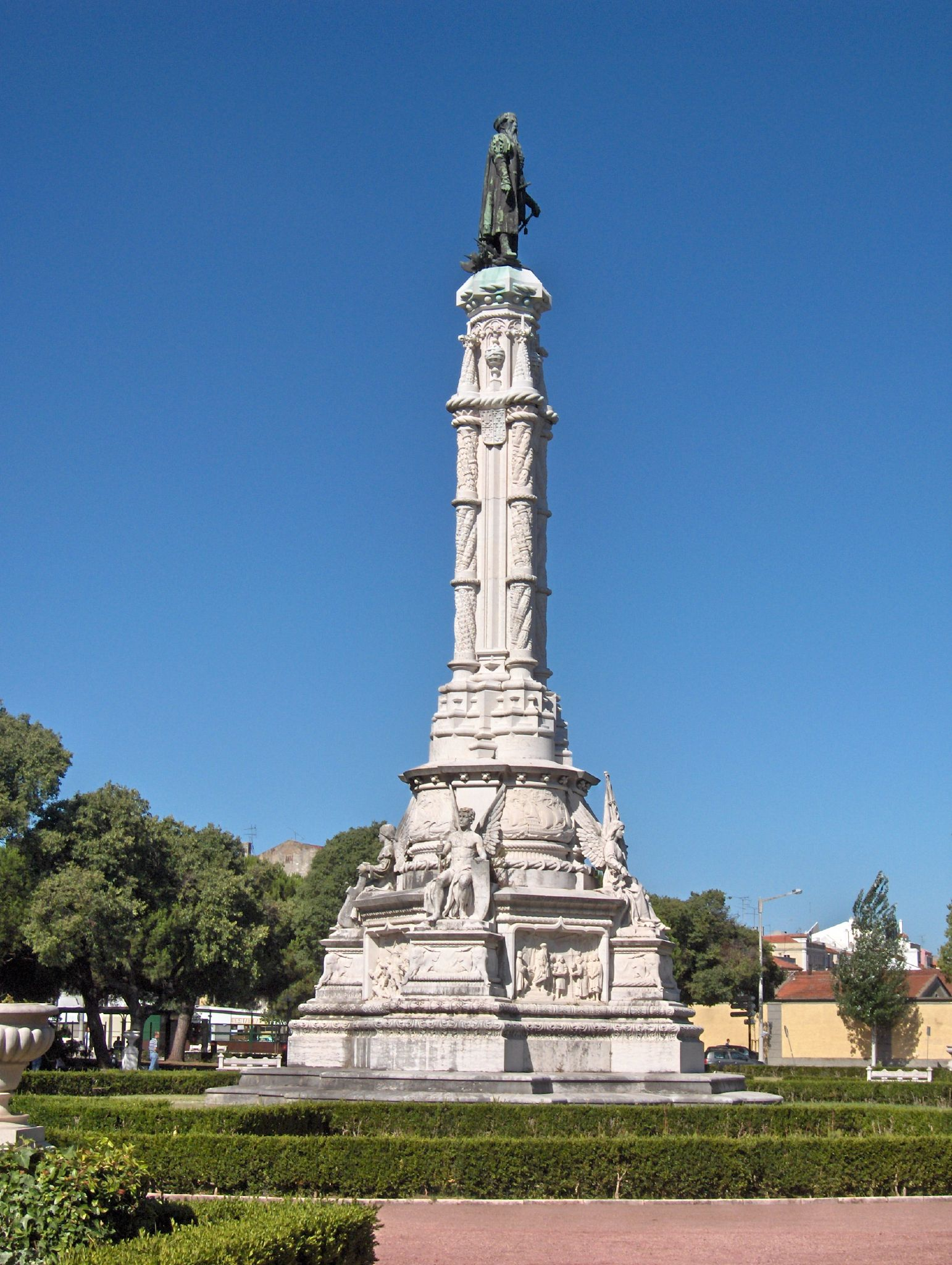 Estátua de afonso de Albuquerque, no Jardim da Praça Afonso de Albuquerque, na freguesia de Santa Maria de Belém, em Lisboa.